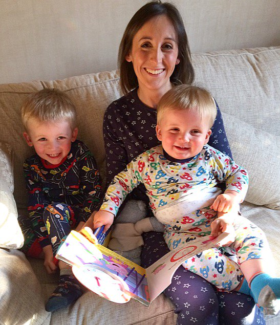 Megan Tywydd a'r plant